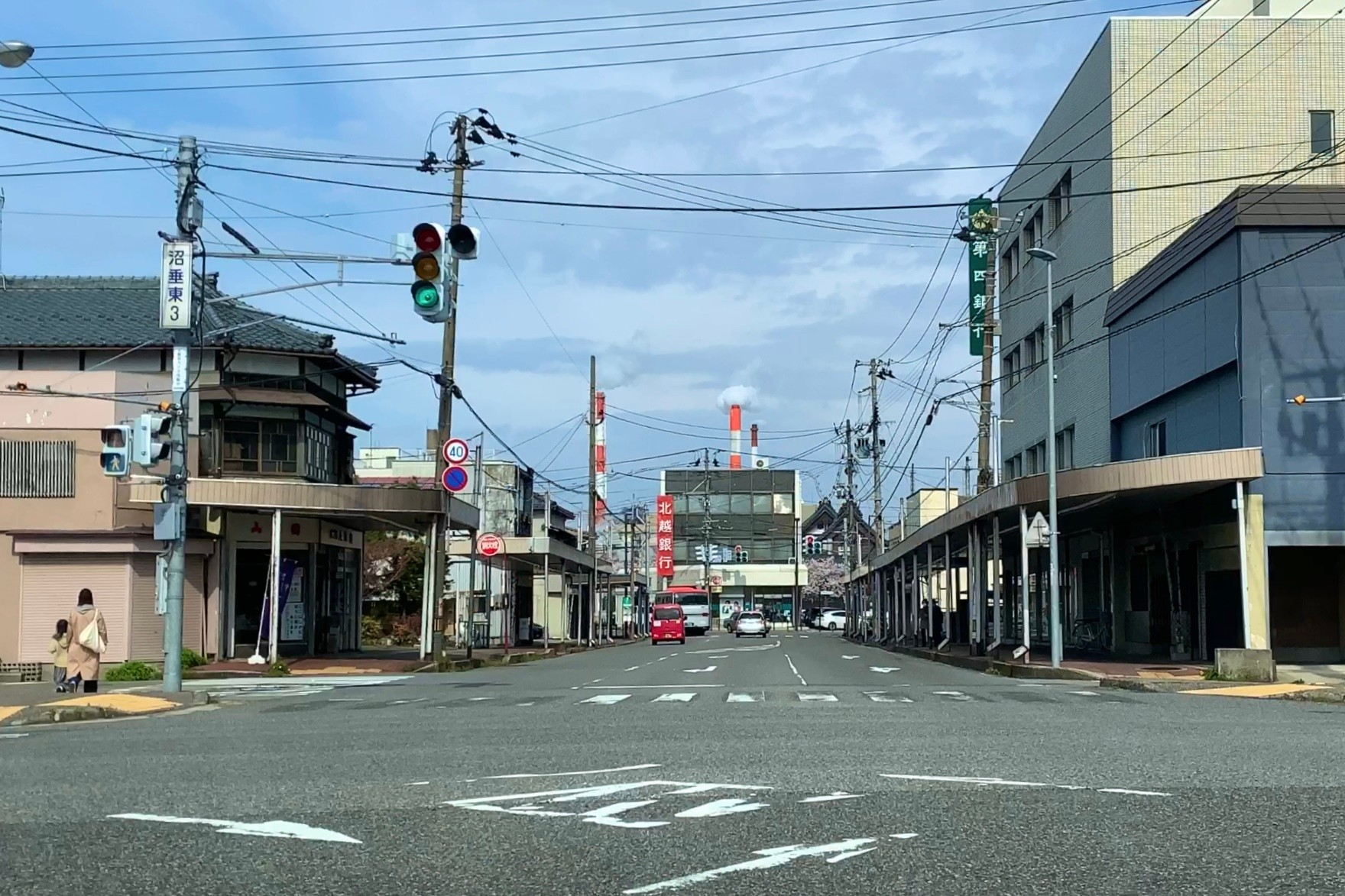 沼垂東（2020年4月）